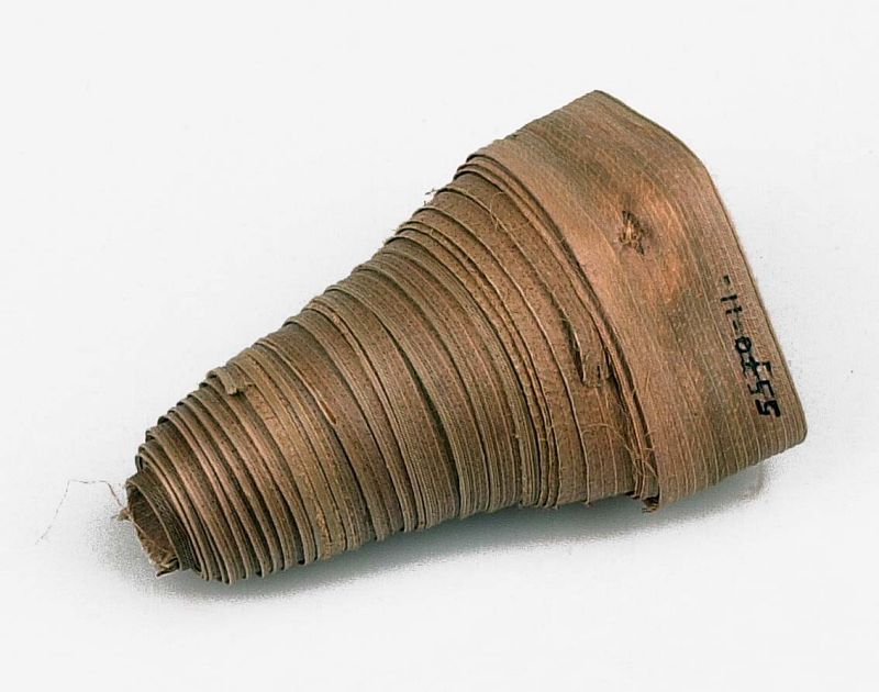 Blaasinstrument. Dubbelriet (schalmei) van plantaardig vezel Unknown language: Wuno nio